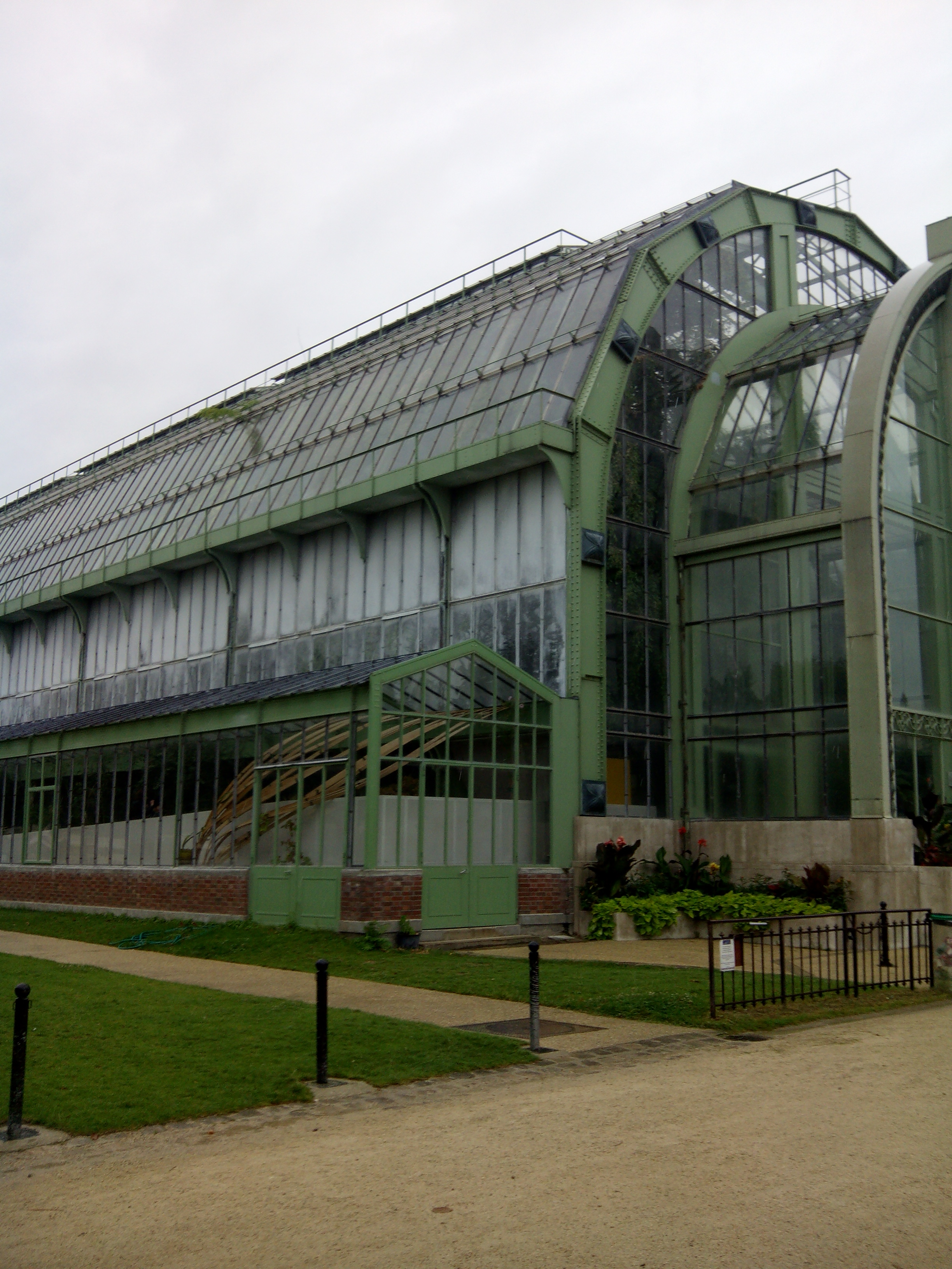 Invernadero del Jardín de las Plantas de París. Agosto de 2014.